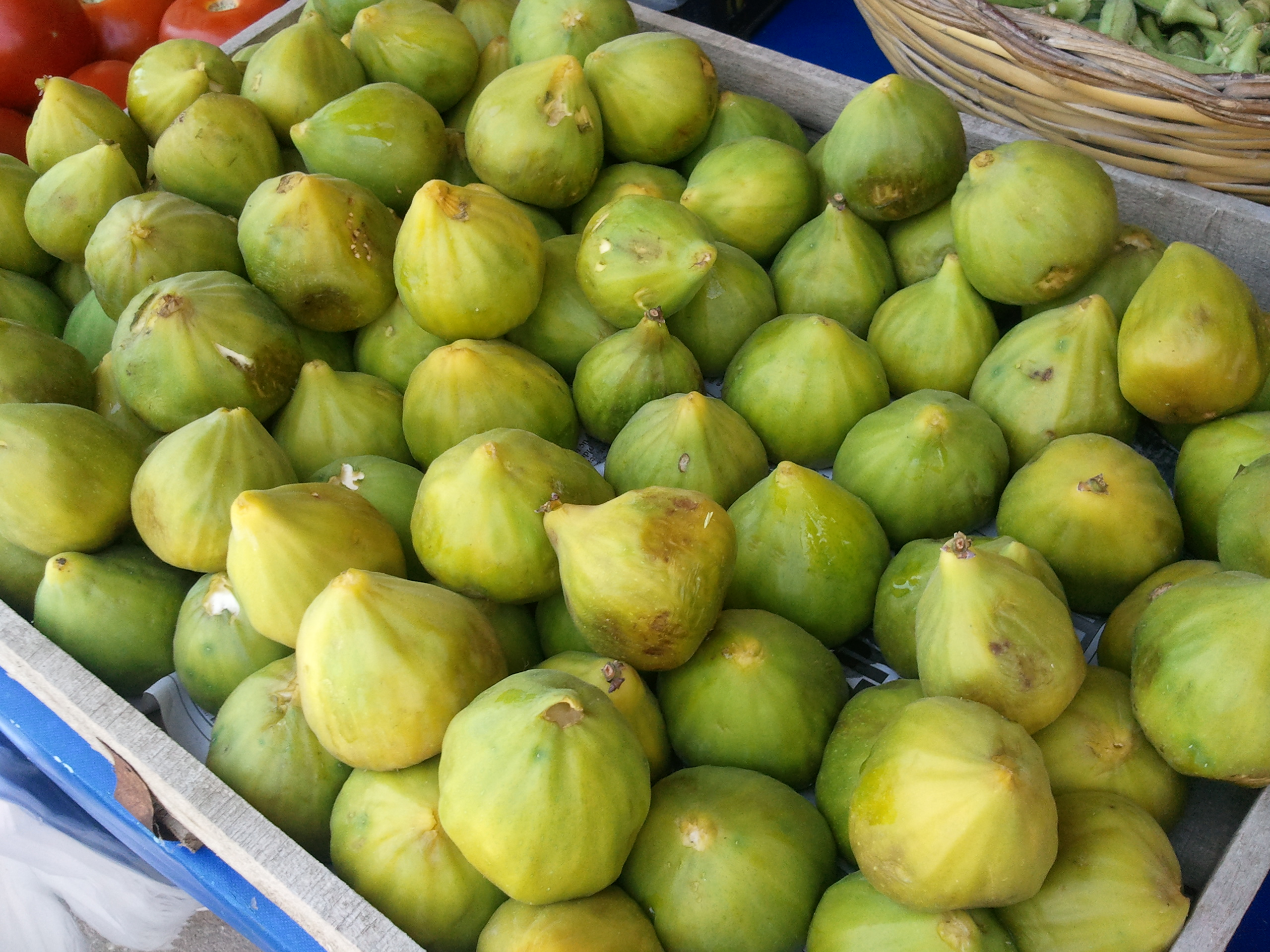 22880 Yaylaköy/Keşan/Edirne, Turkey